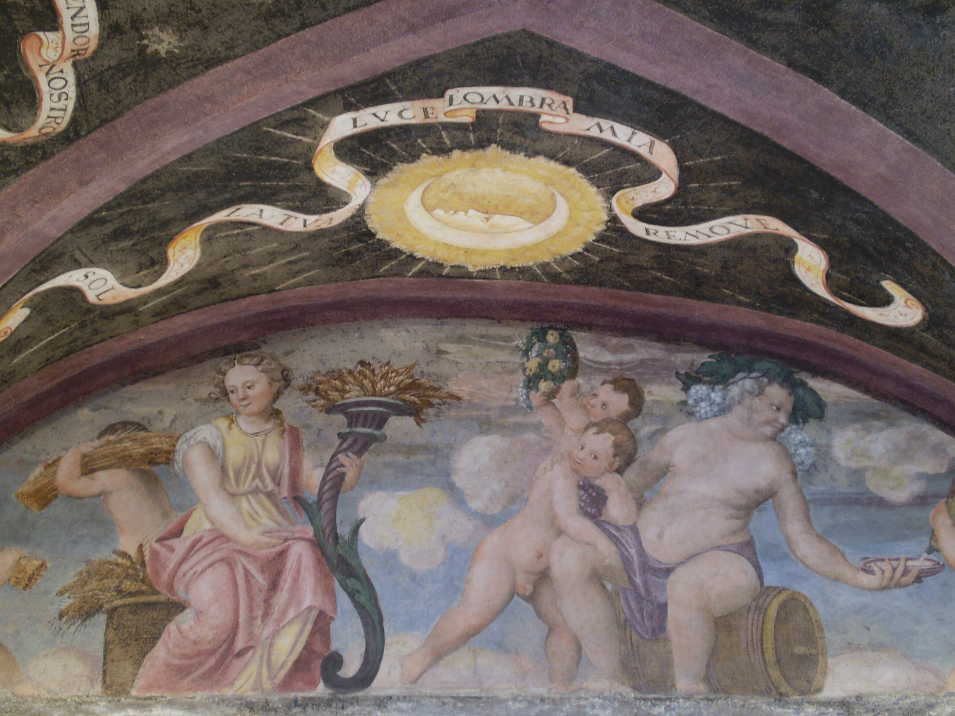 Una delle quattro lunette nella Stanza dell’Erker al secondo piano del Palazzo Assessorile di Cles, raffigurante divinità quali Bacco e Cerere; nei cartiglio è possibile leggere la scritta “Sol la tua luce lombra remove”.